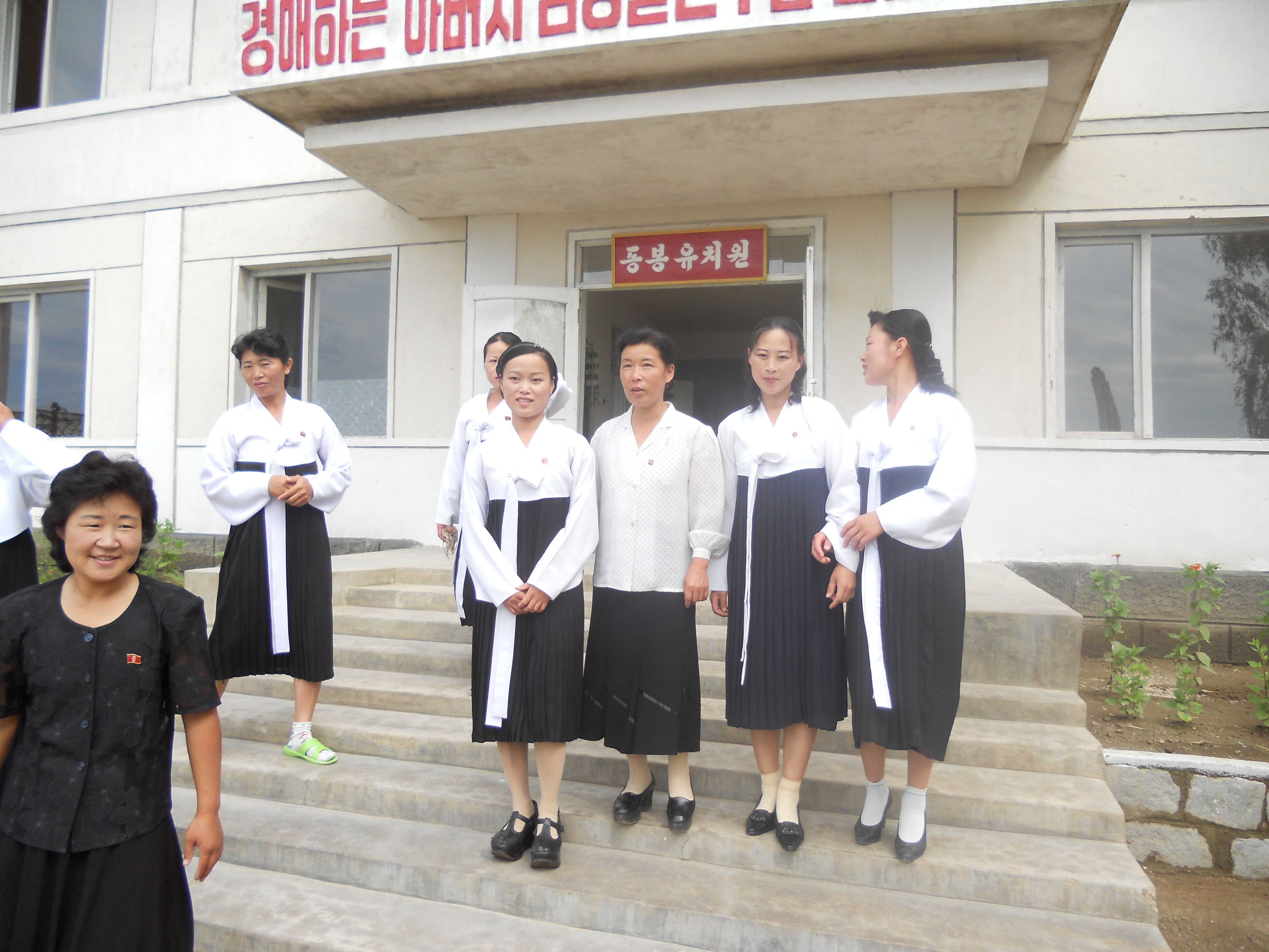 Teachers